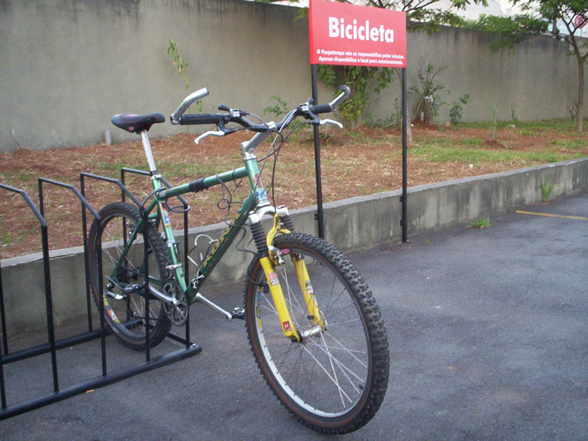 1995 Kona Kula Hardtail Mountain Bike